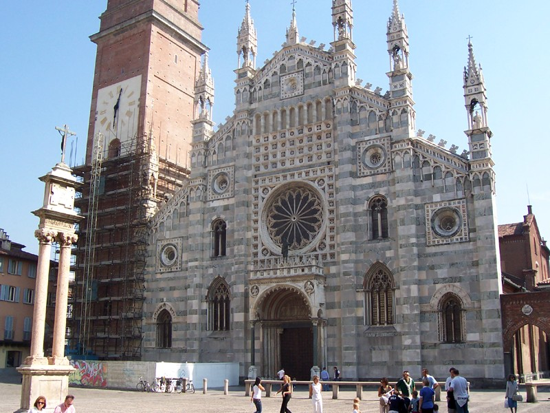 La facciata del Duomo di Monza, progettata alla metà del XIV secolo da Matteo da Campione.